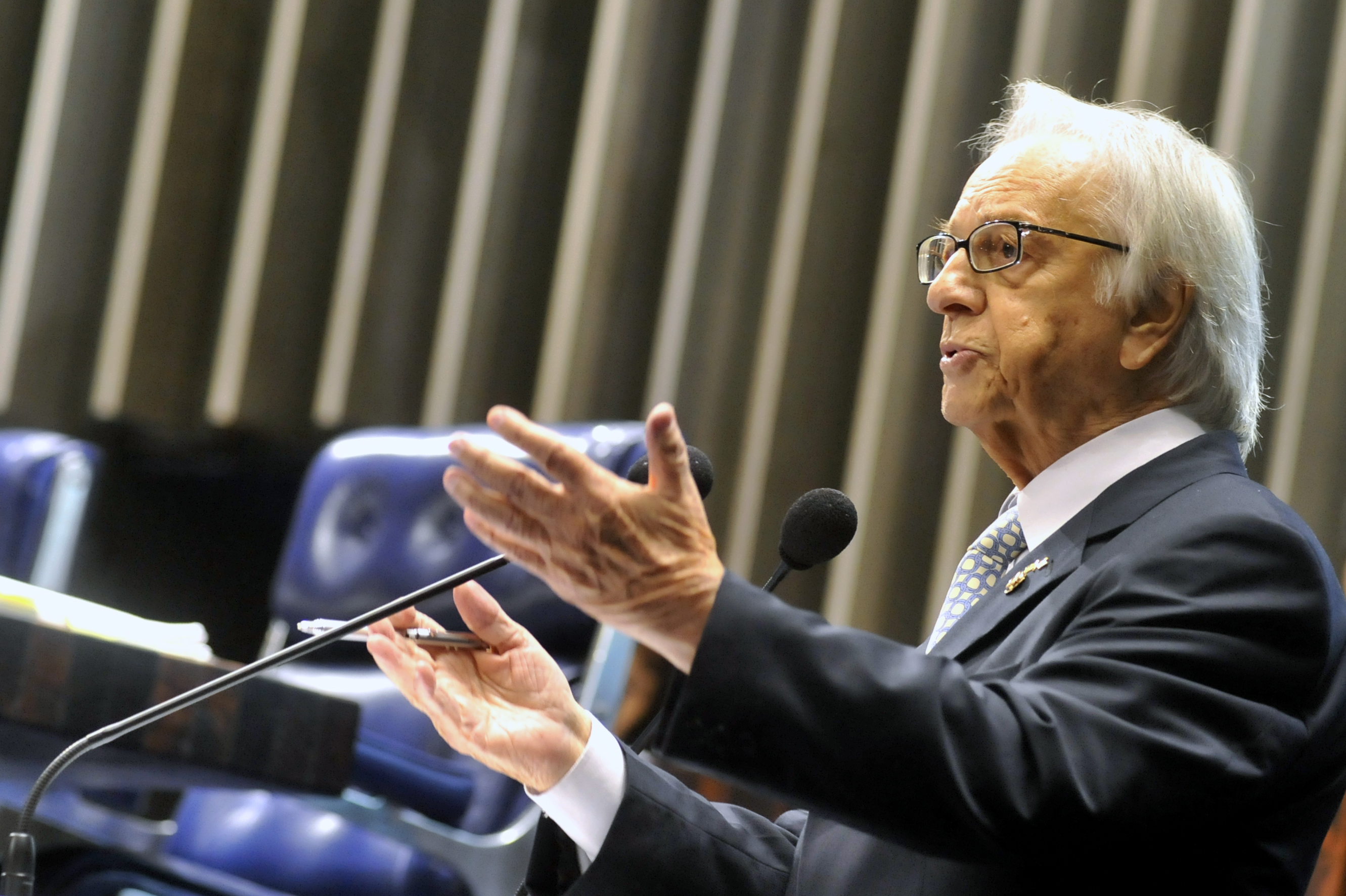 Brasília - O senador Itamar Franco fala na tribuna do Senado durante discussão em plenário sobre o tratado de Itaipu.